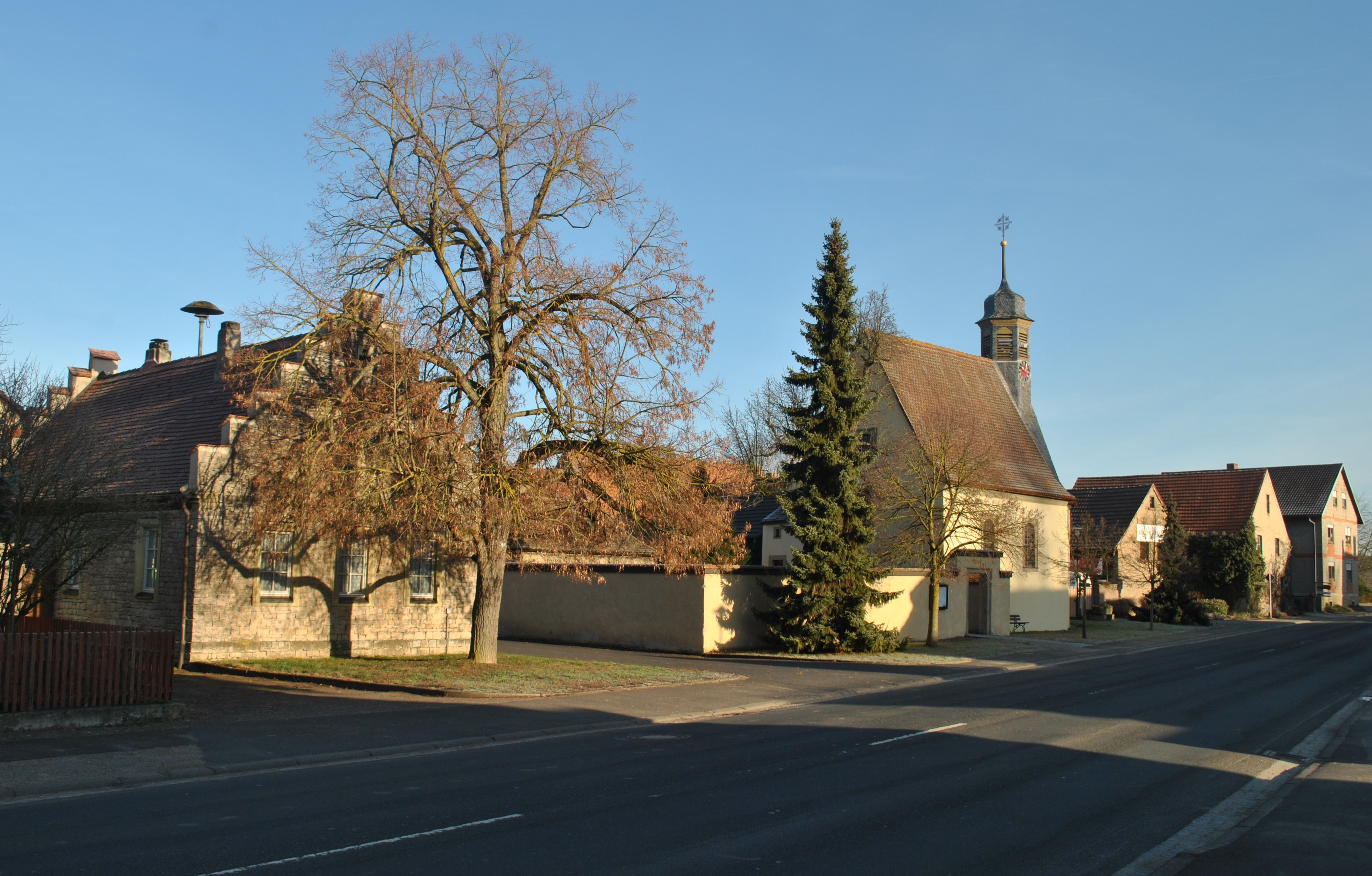 Ortskern Düllstadt mit ehemaligem Rathaus, Ludwigslinde (vor dem Rathaus), Michaelskirche entlang der Bamberger Straße